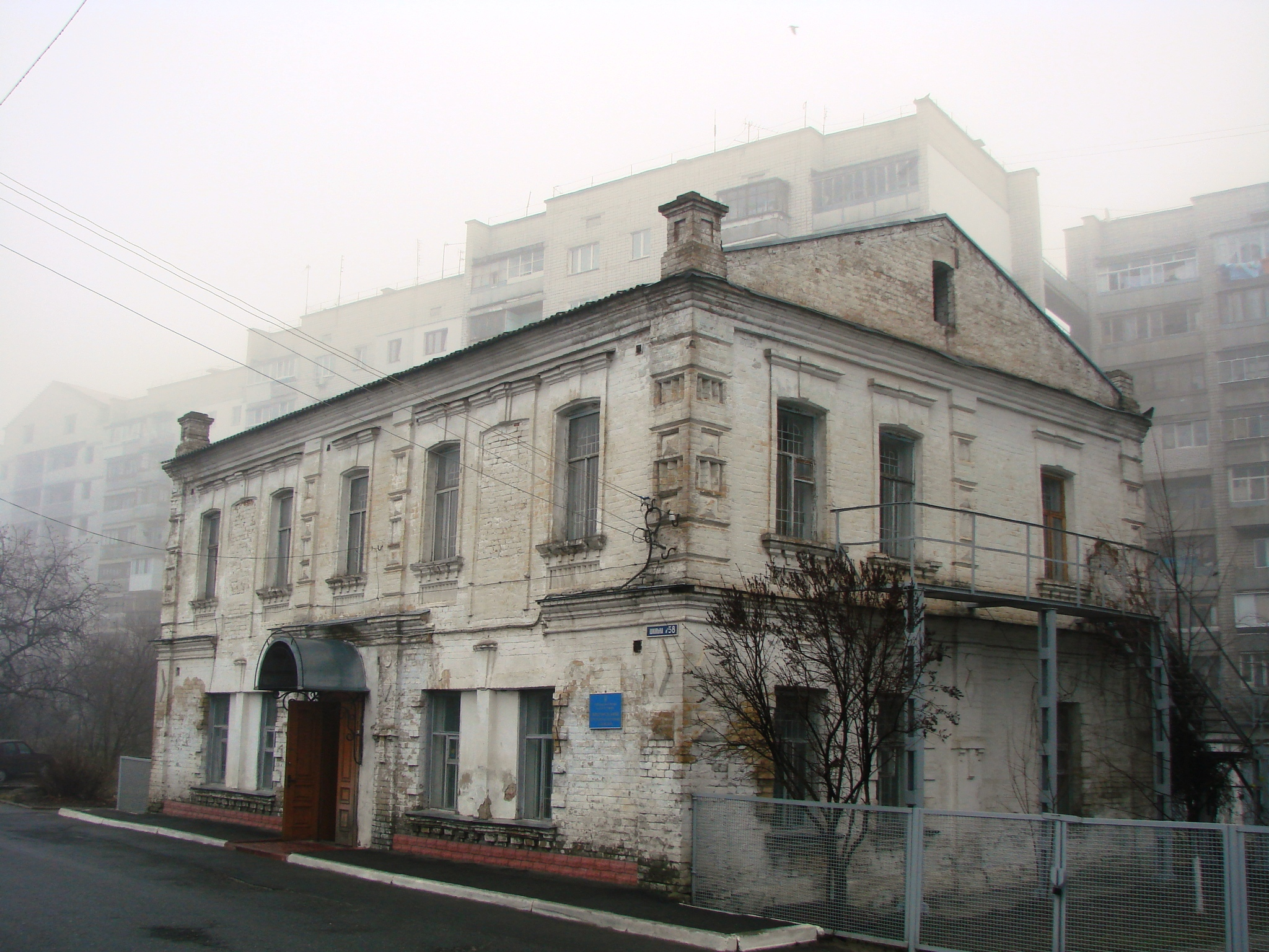 Житловий будинок «Клюкви» (мур.), Вишгород